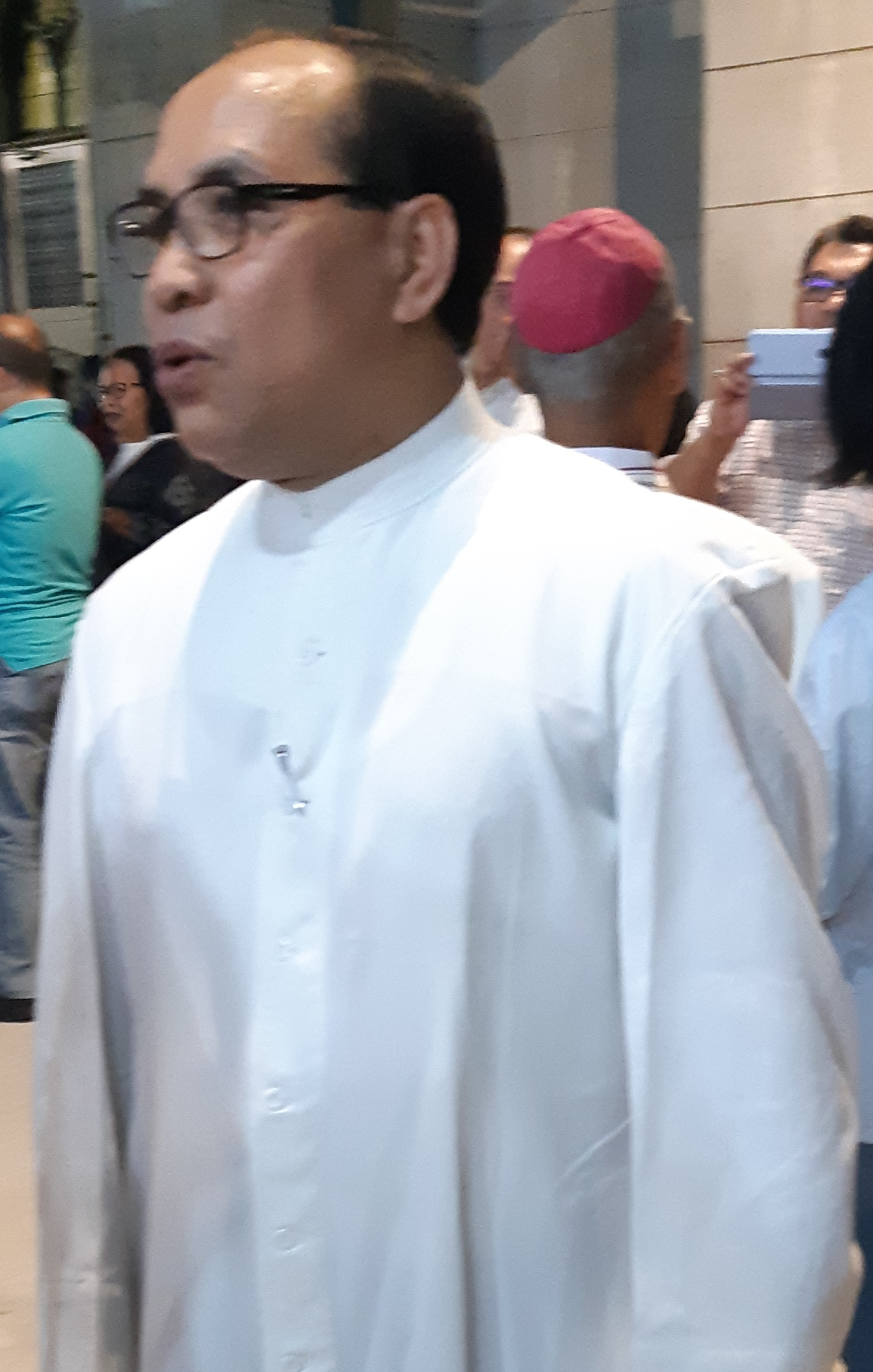 Mgr Siprianus Hormat, Uskup Ruteng